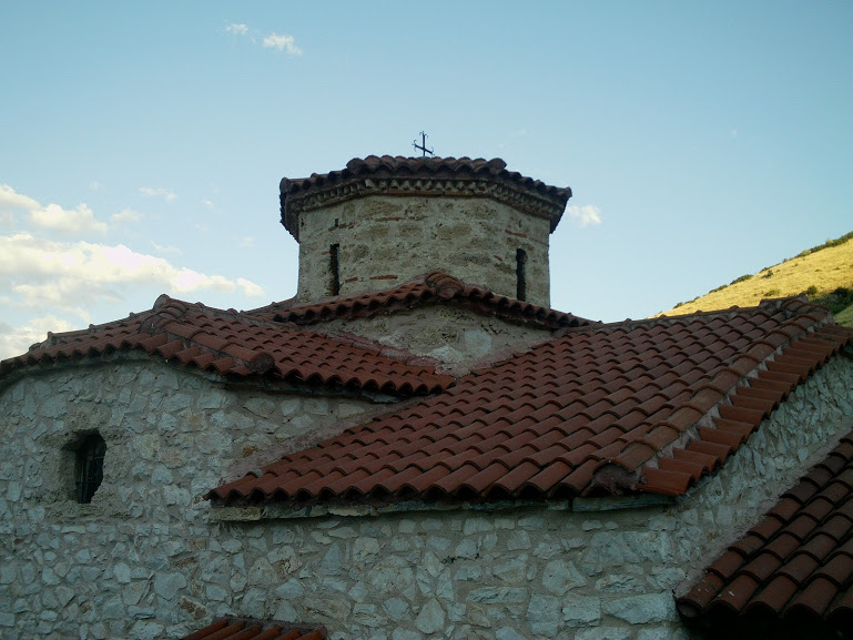 Άγιος Αθανάσιος